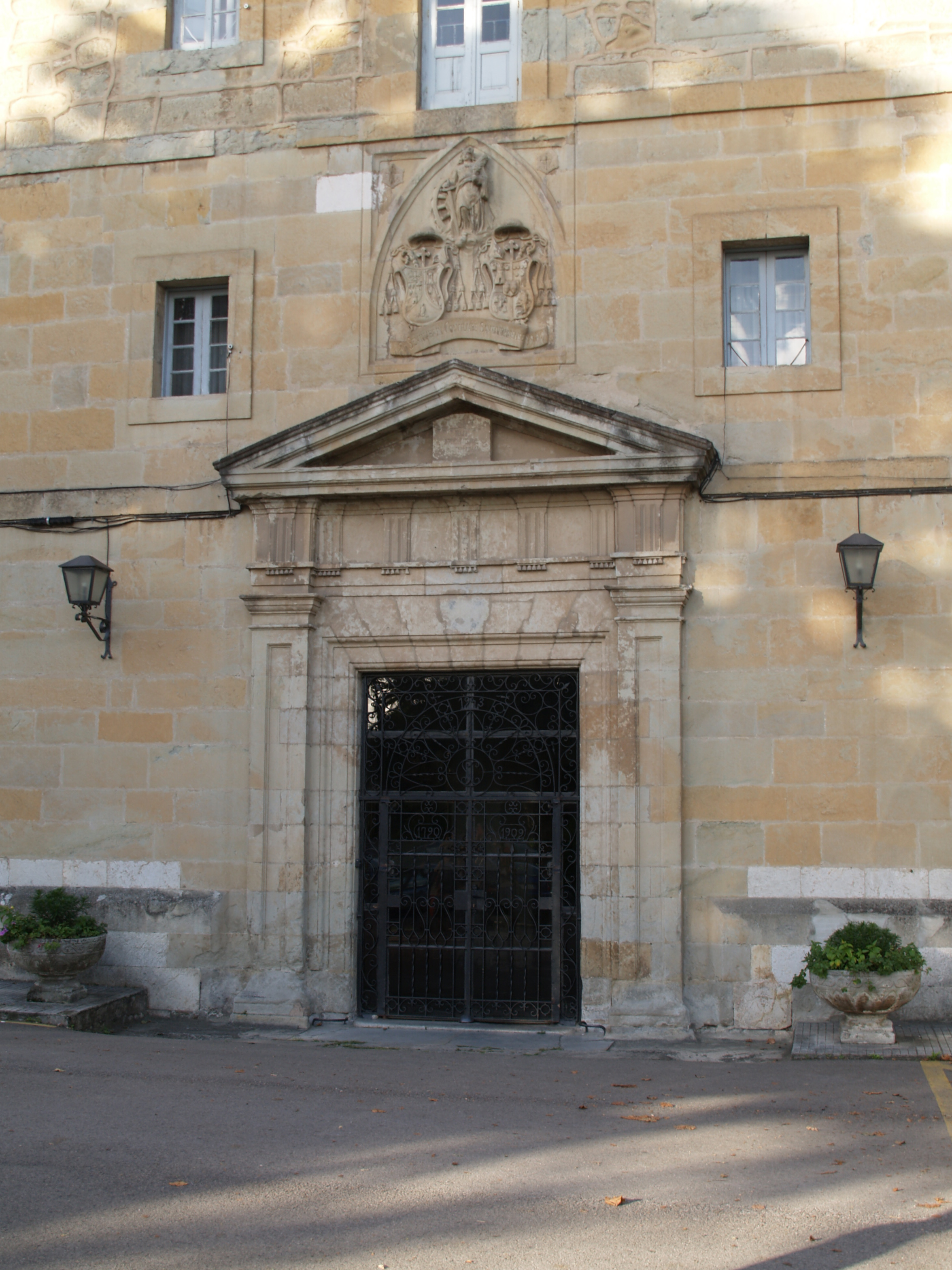 Es un seminario situado en Corbán.